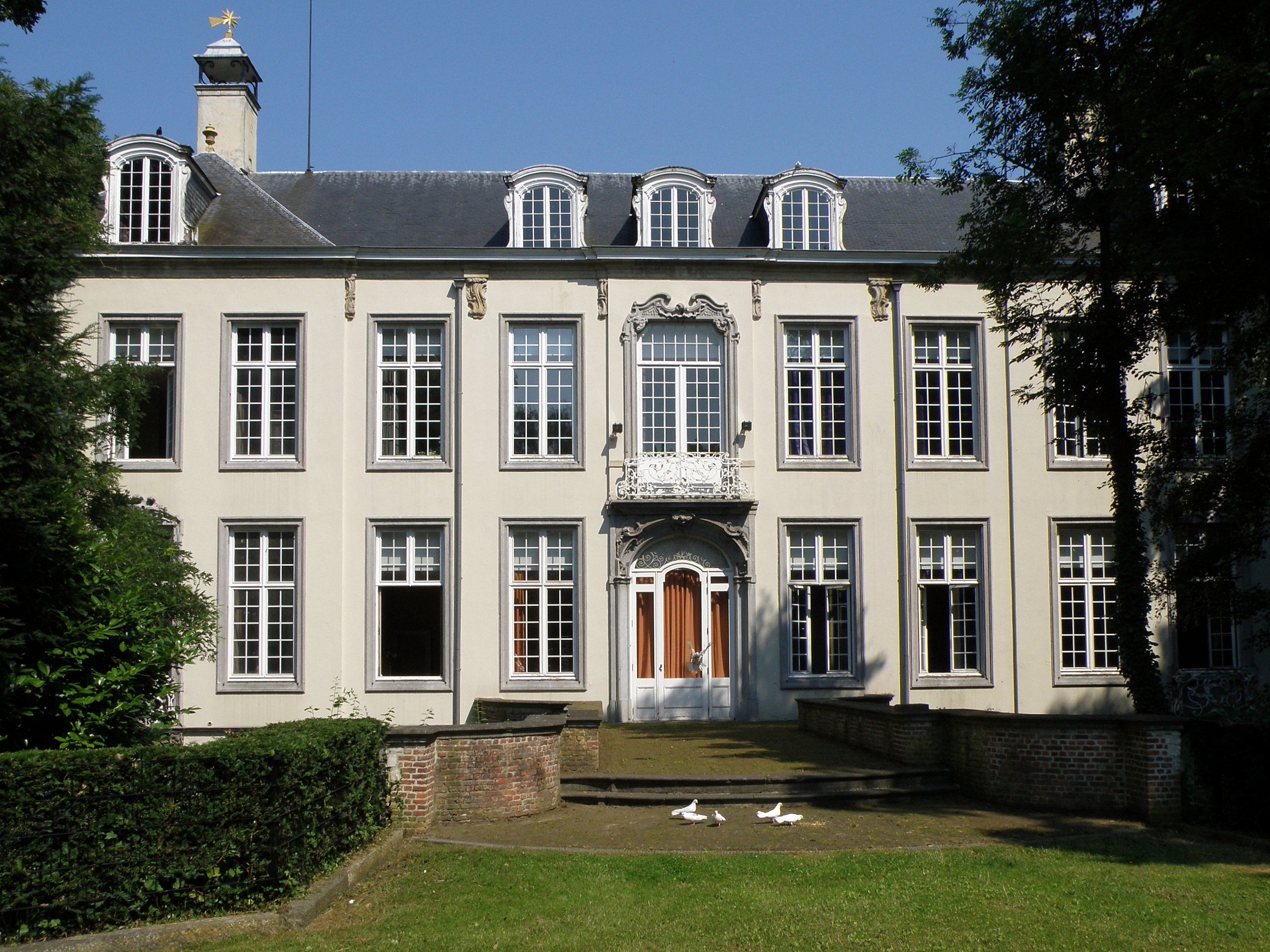 Antwerpen, district Deurne. Kasteel Boekenberg, Gouverneur Holvoetlaan 28, ca. 1750, n.o.v. archit. J.P. Van Baurscheit de jonge. Achtergevel.